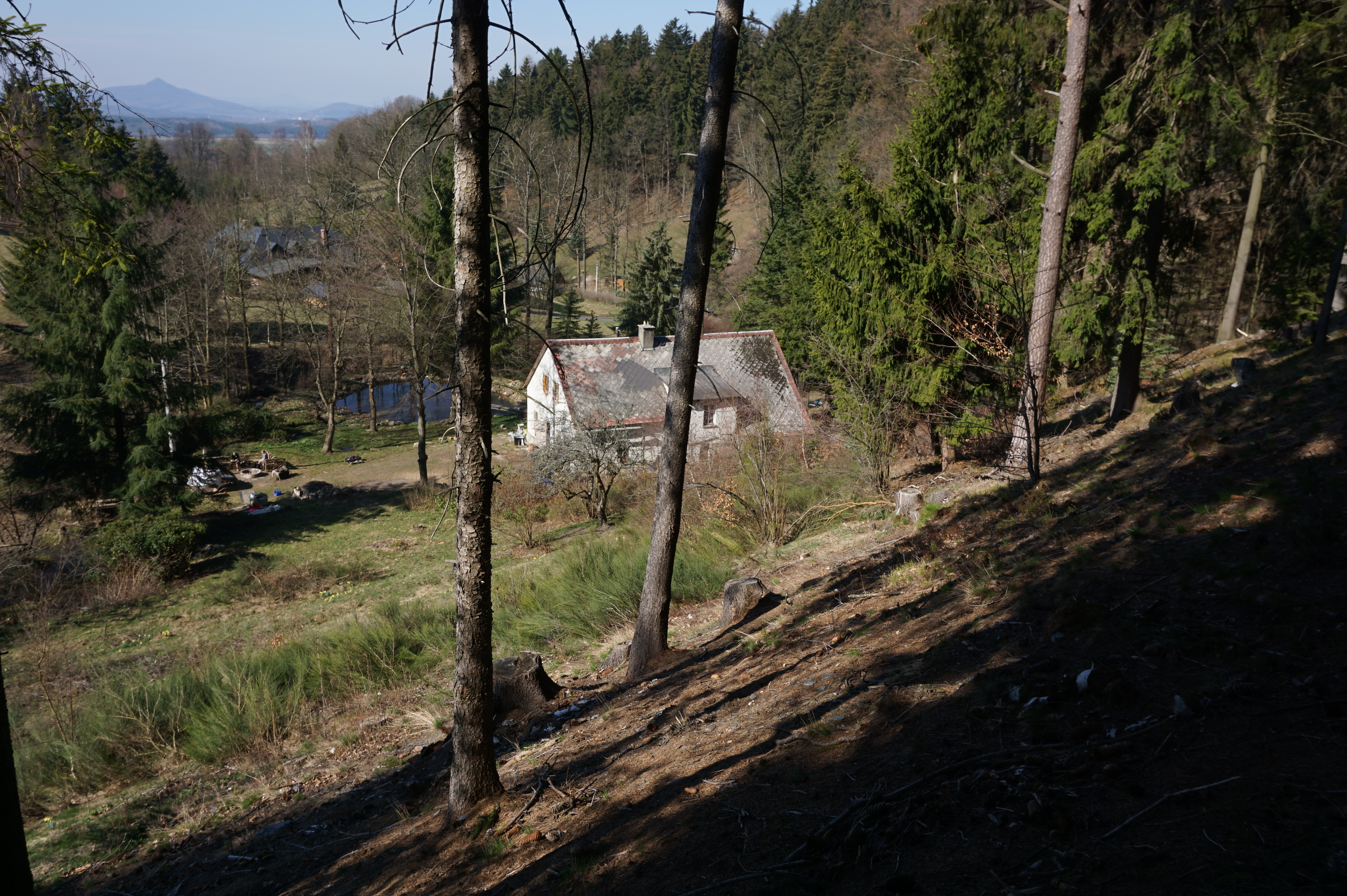 Křižany (Světlá pod Ještědem) - dům čp. 3